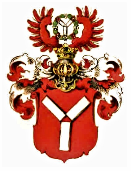 Herb Schindel